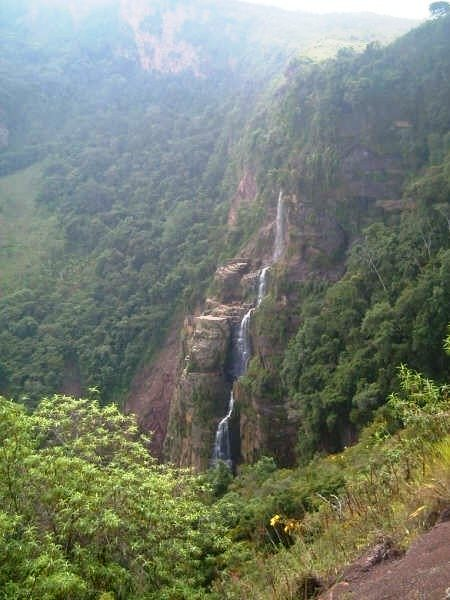 Salto Blanco, en Betulia, Santander